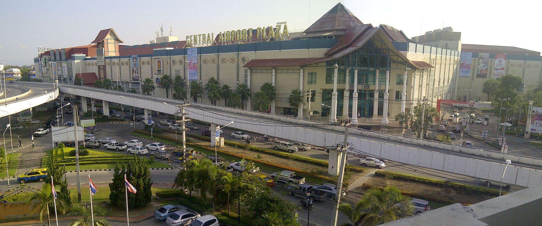 เซ็นทรัล พลาซ่า เชียงใหม่ แอร์พอร์ต